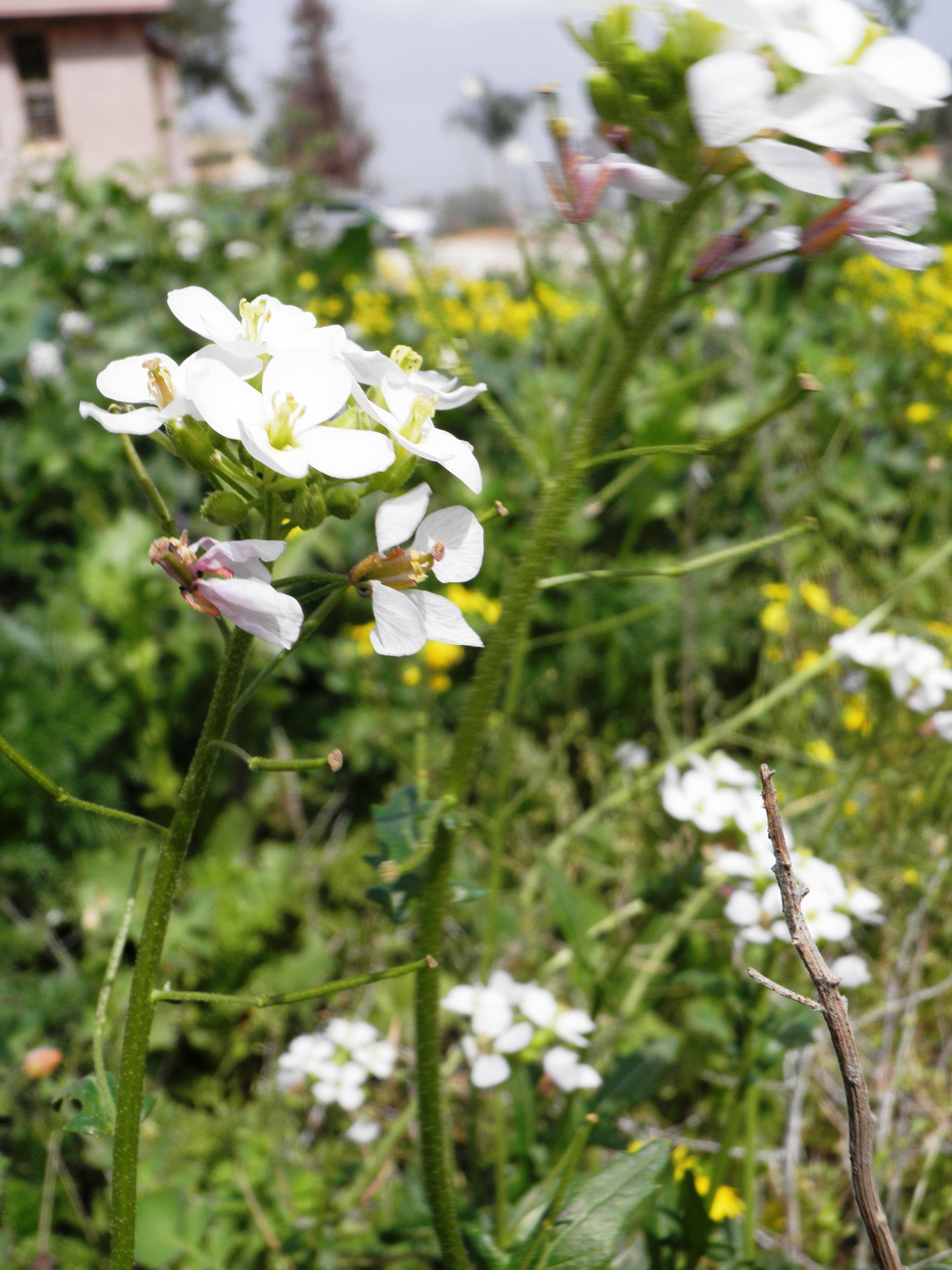 טוריים מצויים